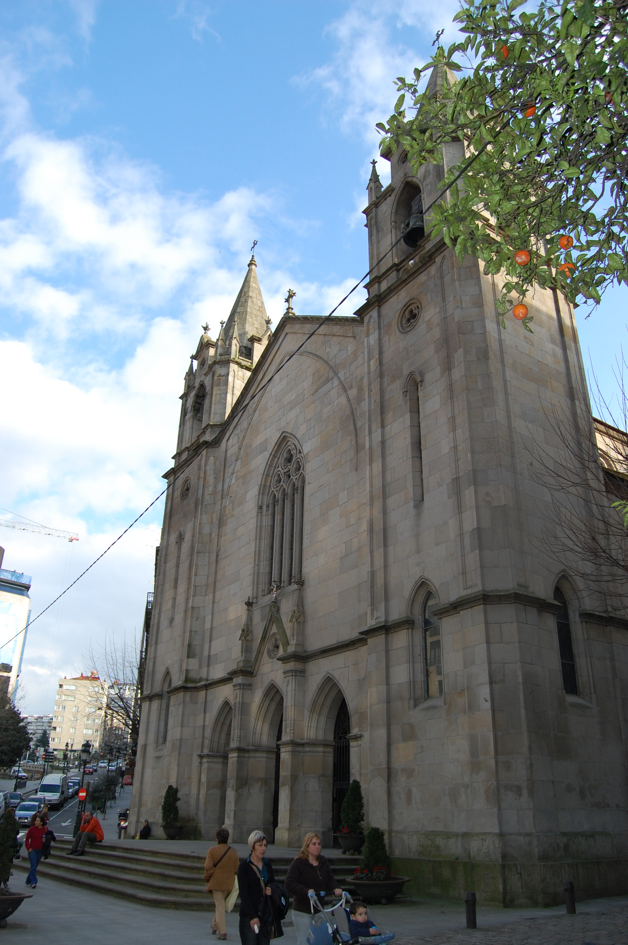 A igreja de Santiago de Vigo.